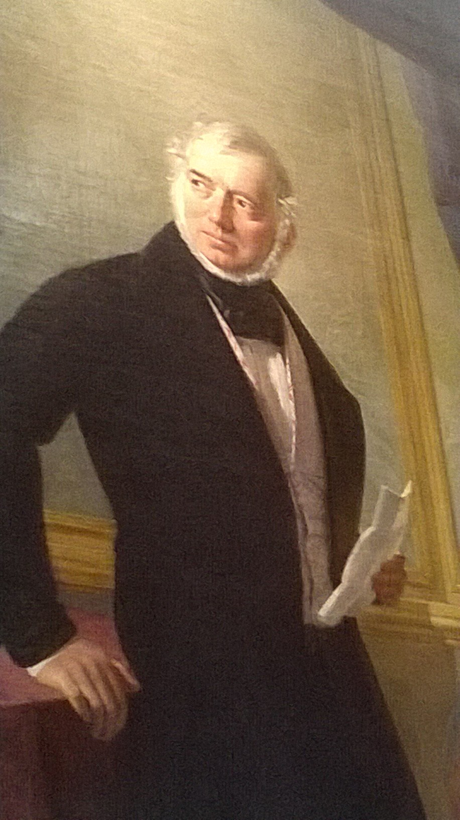 Ritratto dell'industriale varesotto Andrea Ponti, XIX secolo - Varese - Ville Ponti - Italia